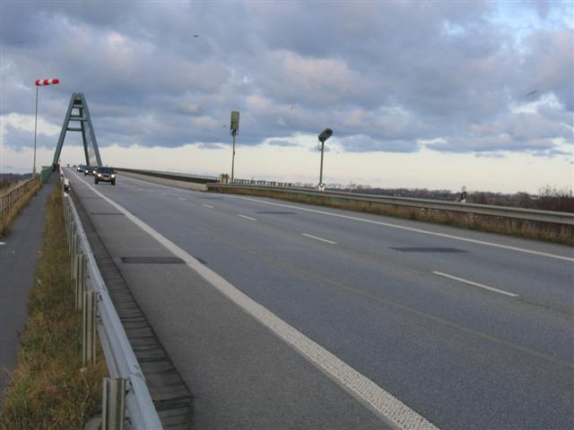 Teerflicken auf der Fehmarnsundbrücke